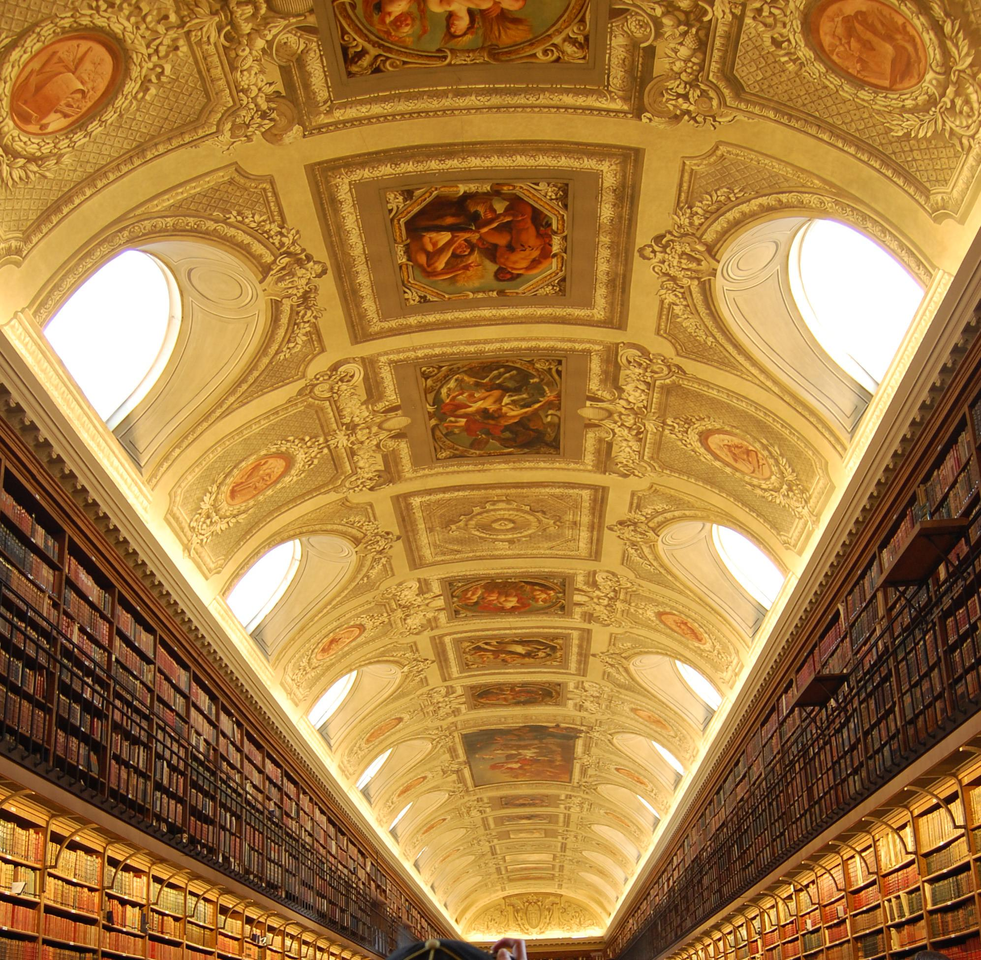 les douze signes du zodiaque par Jacob jordanes 1640 plafond de la bibliotheque annexe du palais du luxemboug